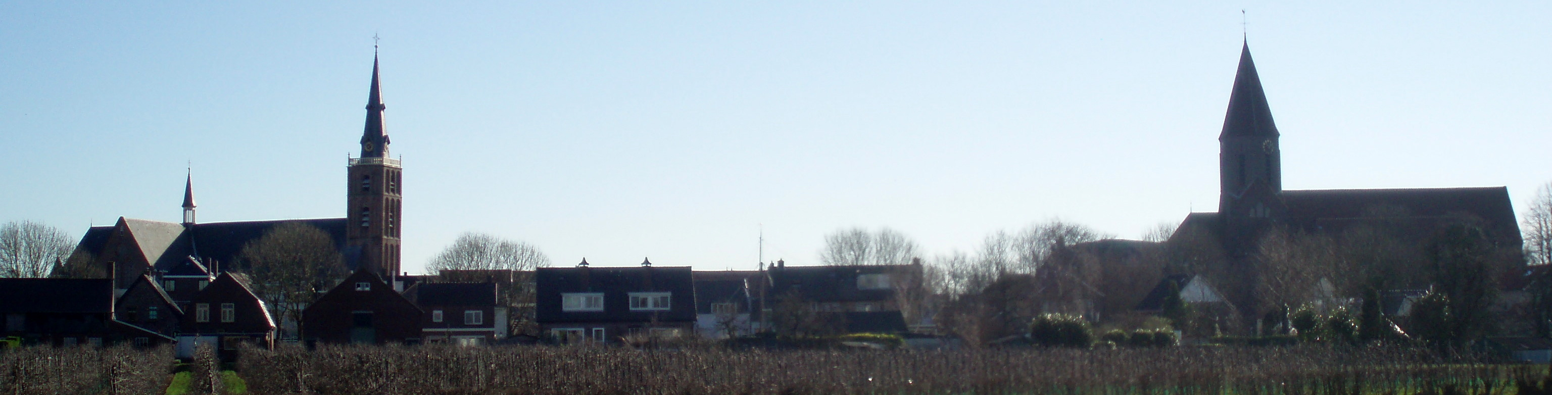 De skyline van Montfoort, gezien vanaf de Cattenbroekerdijk.